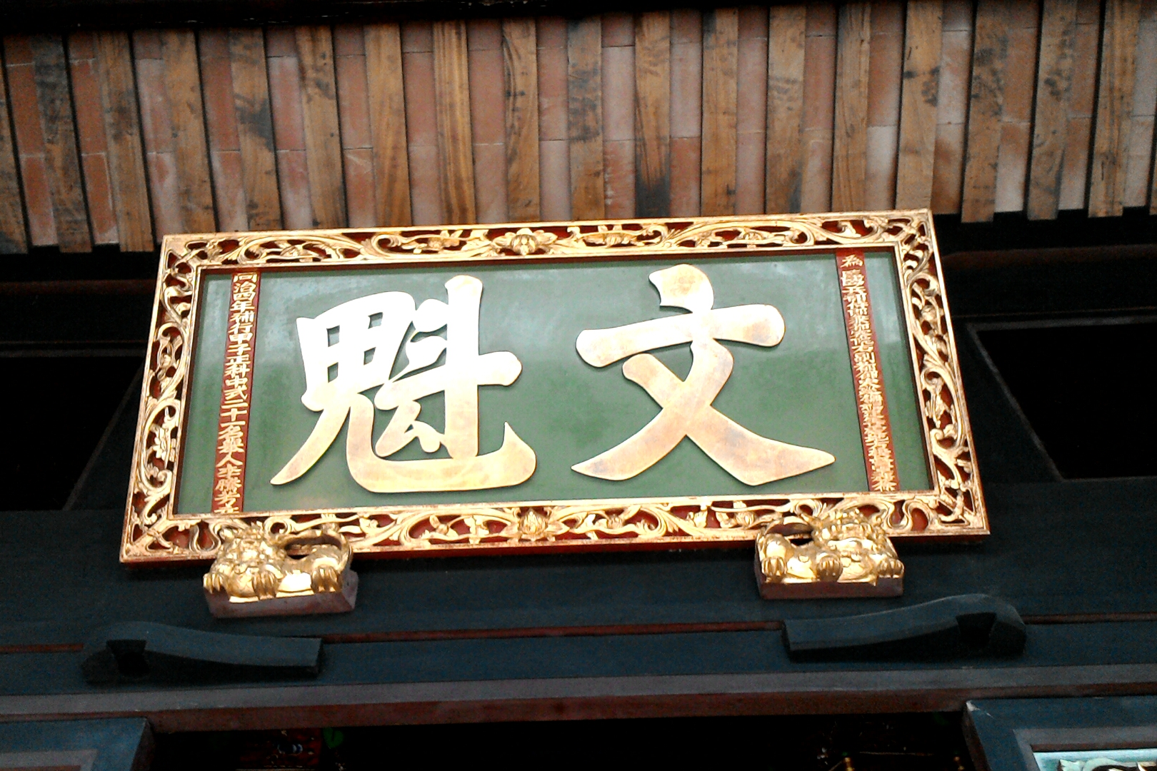 李騰芳古宅中徐宗幹所贈匾額,桃園市大溪區月眉里